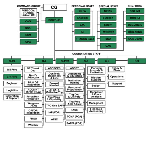 Organigramm des United States Army Training and Doctrine Command